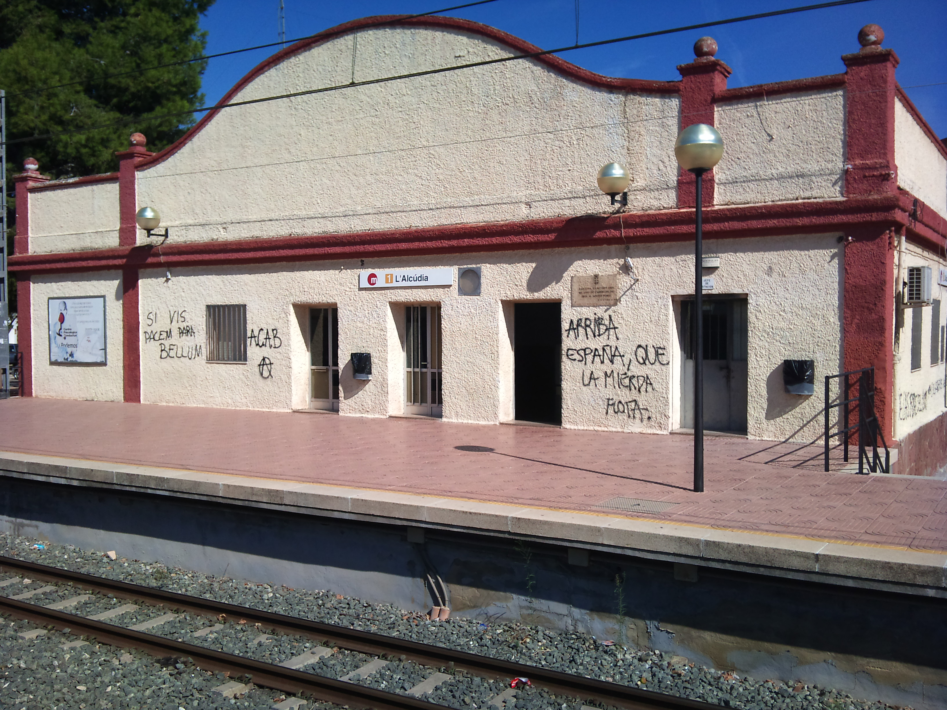 Línia 1 de metrovalencia.